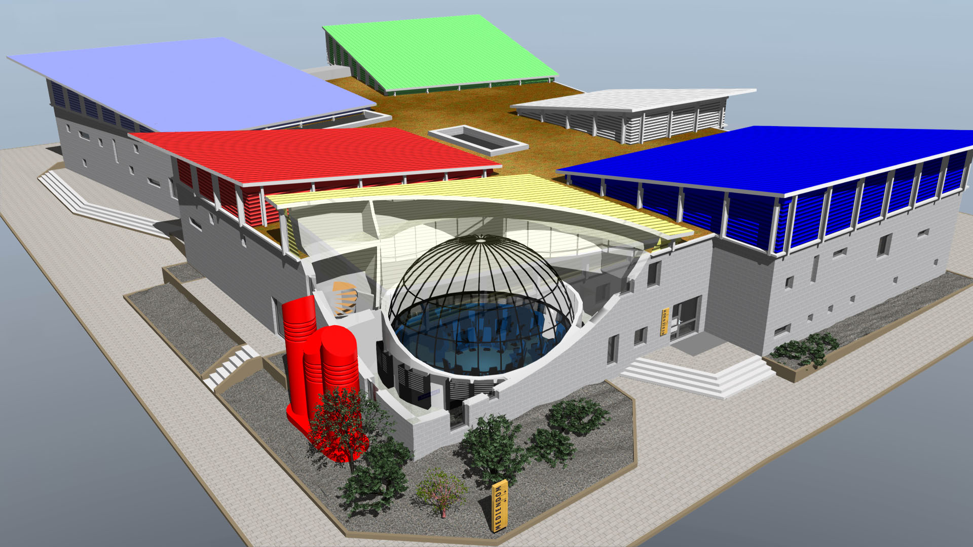 Aufriss des Großen Hörsaalgebäudes der Fachhochschule Kiel mit einem Blick in die Mediendom-Kuppel. Grafik: Bastian Barton